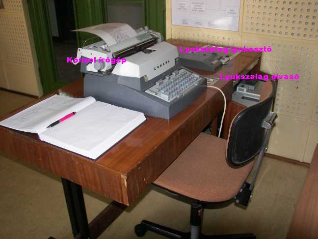 A Practicomp 4000 kisszámítógép konzolasztala